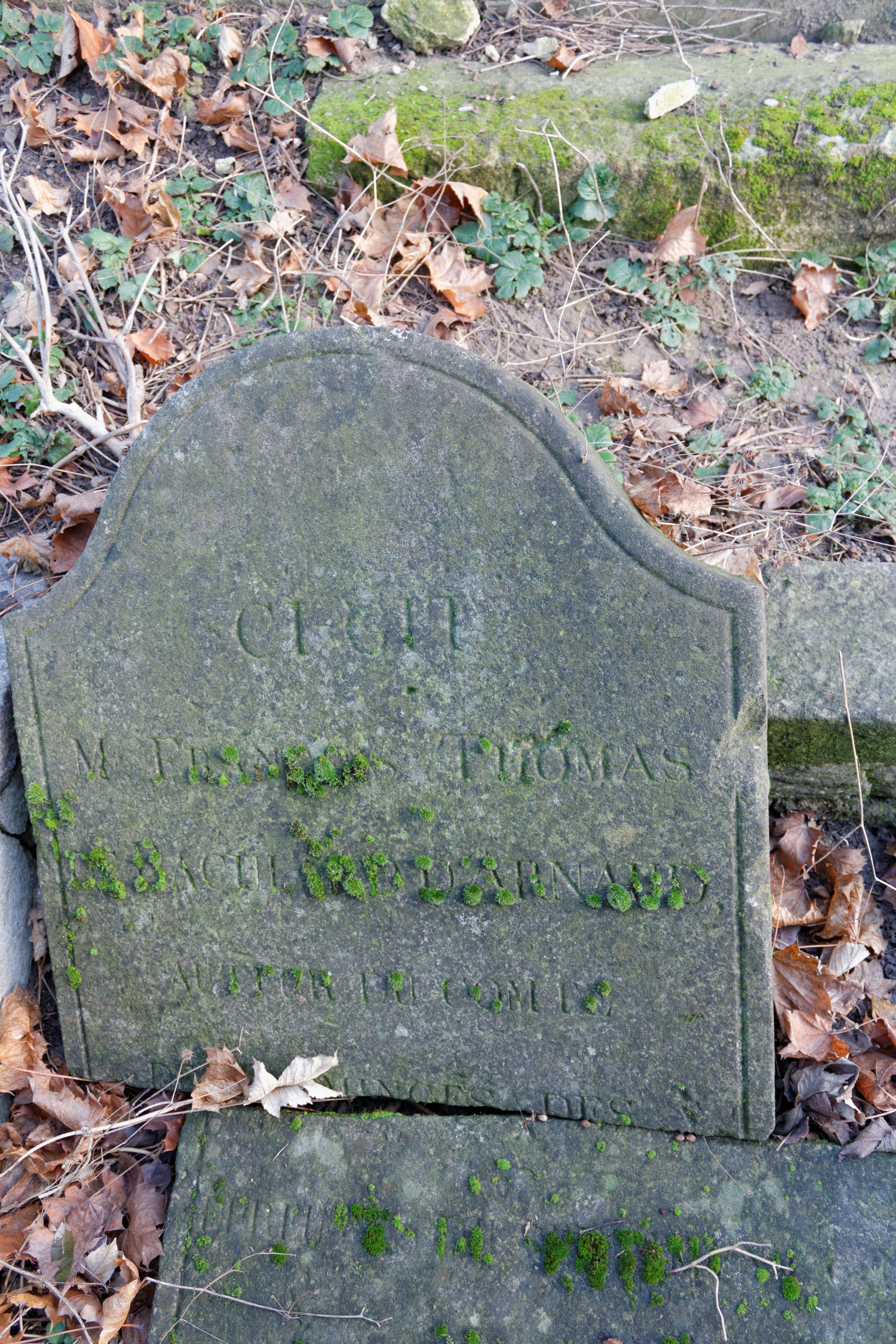 Stèle